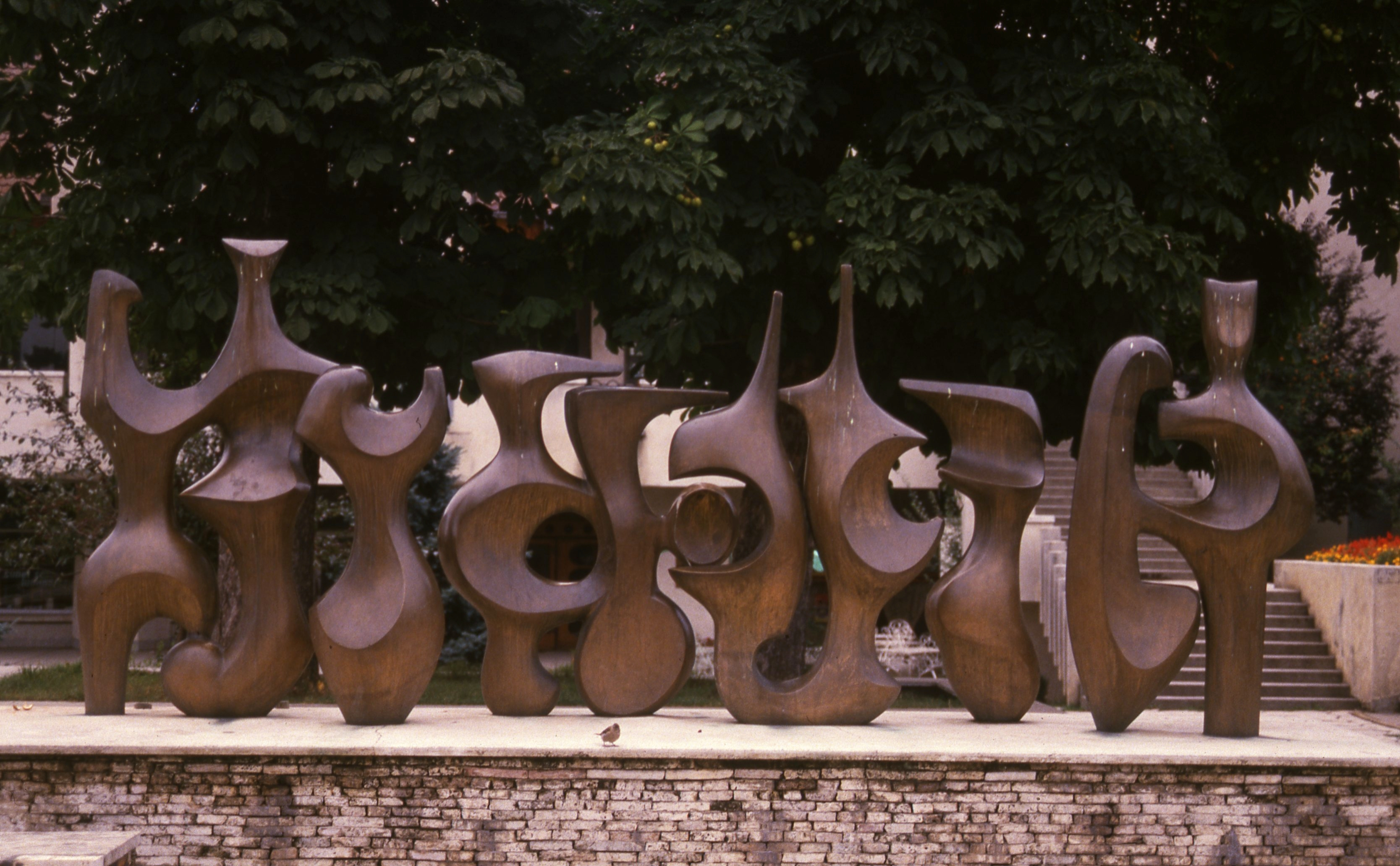 Színház tér (Piata Teatrului), Térkompozíció (Kulcsár Béla, 1974.)[1]. Location: Romania, Transylvania, Tirgu Mures Tags: colorful, public art Title: Színház tér (Piata Teatrului), Térkompozíció (Kulcsár Béla, 1974.).